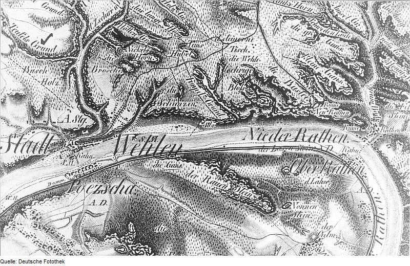 Original image description from the Deutsche Fotothek Stadt Wehlen. Oberreit, Sect. Stolpen, 1821/22